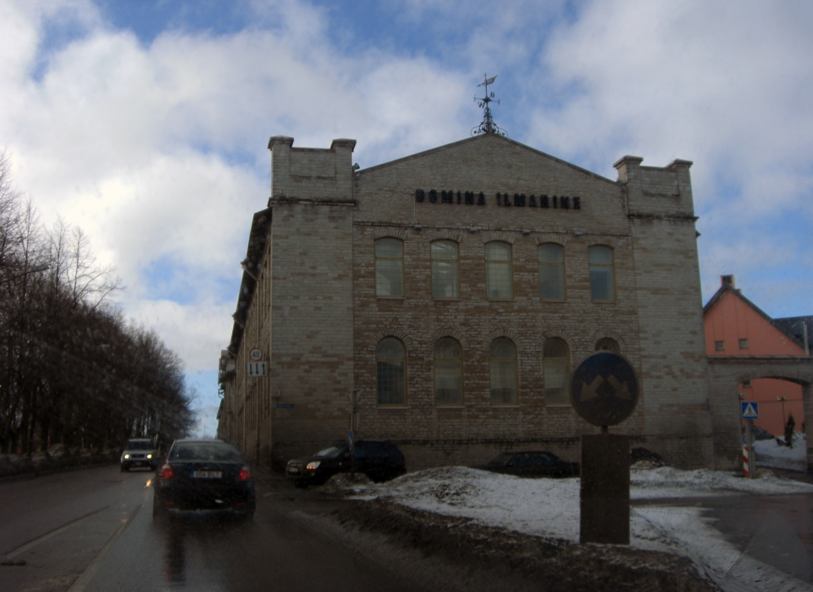 Ilmarine